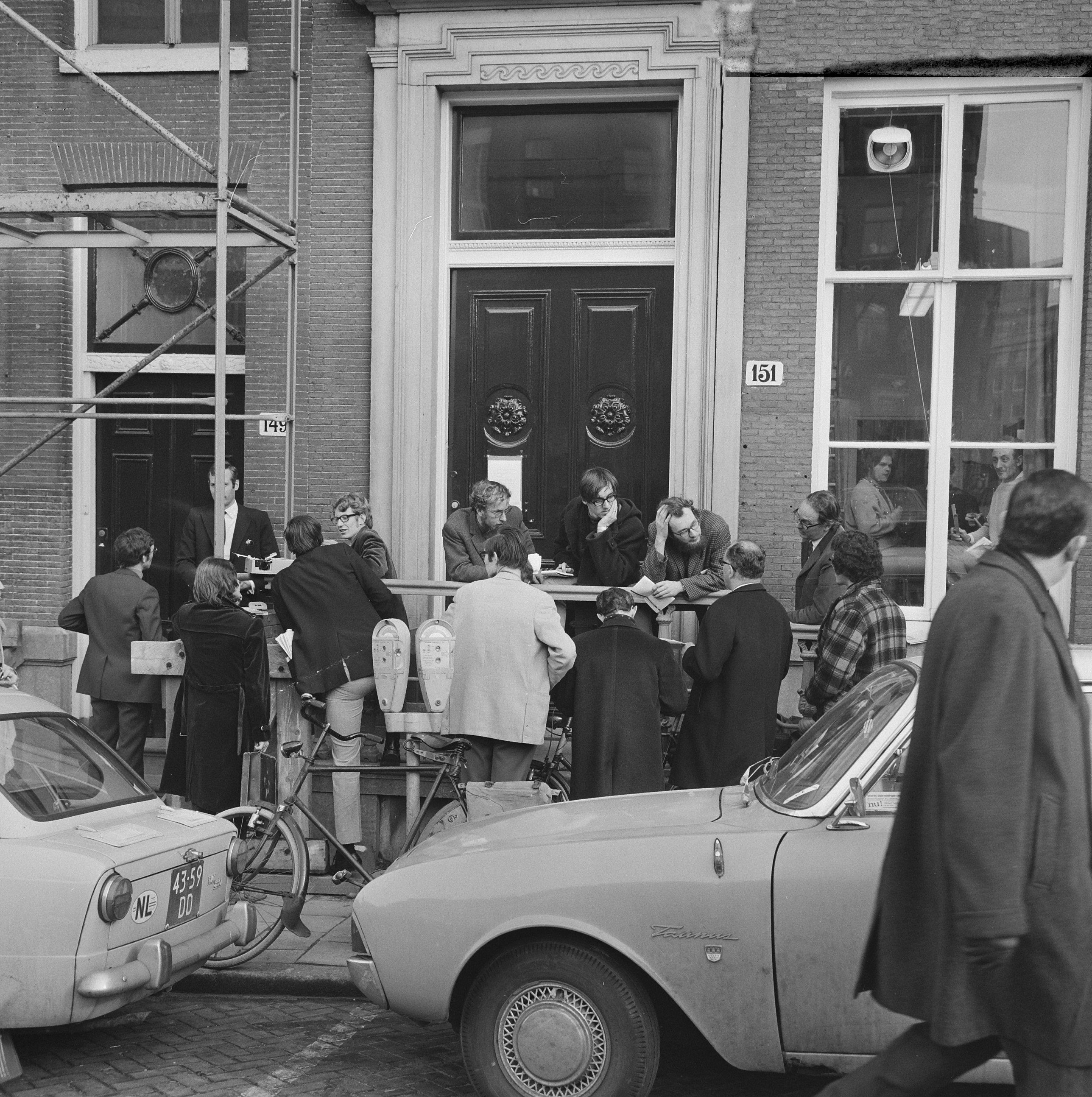 Collectie / Archief : Fotocollectie Anefo Reportage / Serie : [ onbekend ] Beschrijving : Redaktie van Folia Civitatis werkt op de stoep voor Instituut voor Perswetenschap aan Turfmarkt Amsterdam wegens sluiting instituut. Redaktie op stoep, Frieswijk Datum : 24 februari 1970 Locatie : Amsterdam, Noord-Holland Trefwoorden : Sluitingen, instituten, stoepen Persoonsnaam : Folia Civitatis Fotograaf : Croes, Rob C. / Anefo Auteursrechthebbende : Nationaal Archief Materiaalsoort : Negatief (zwart/wit) Nummer archiefinventaris : bekijk toegang 2.24.01.03 Bestanddeelnummer : 923-2852